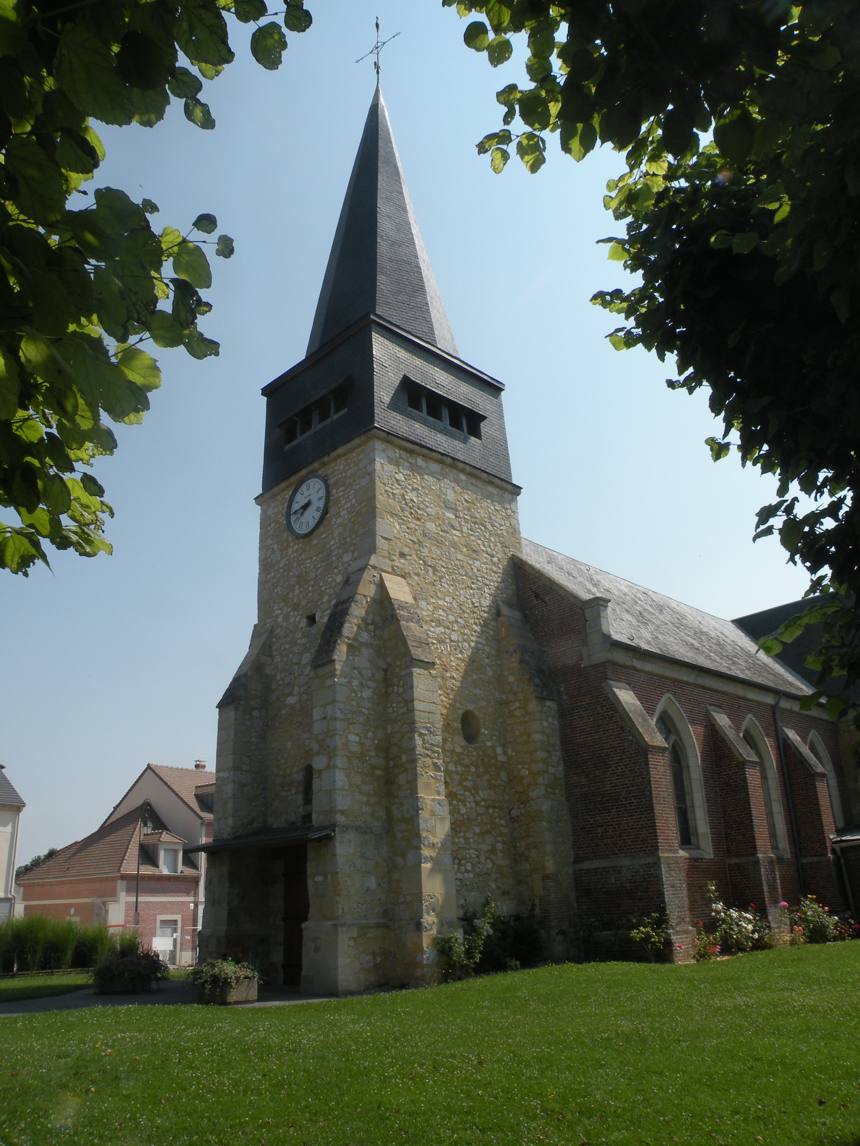 église Saint-Germain de Laversines